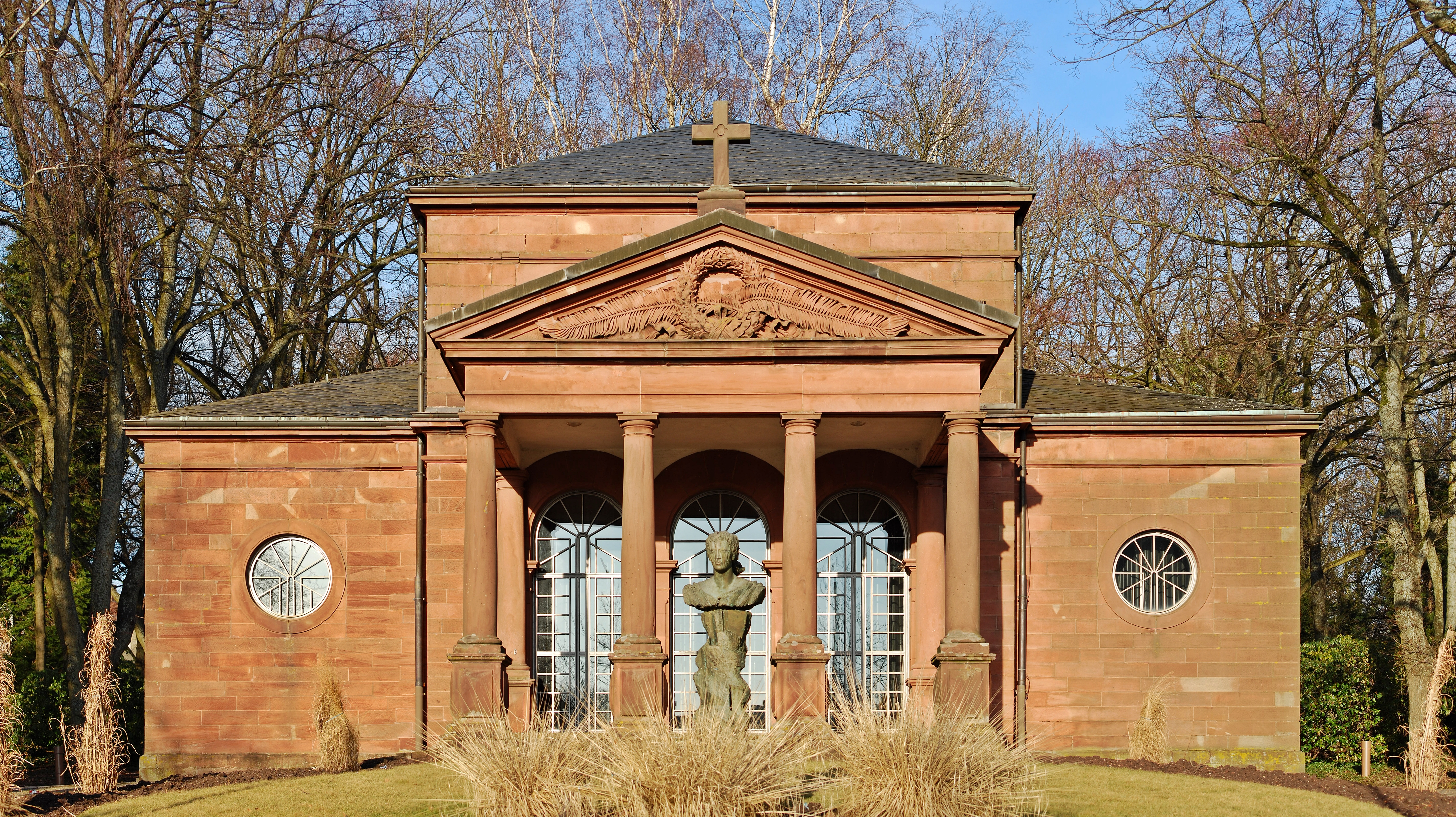 Der Carolinensaal in Pirmasens, Rheinland-Pfalz.